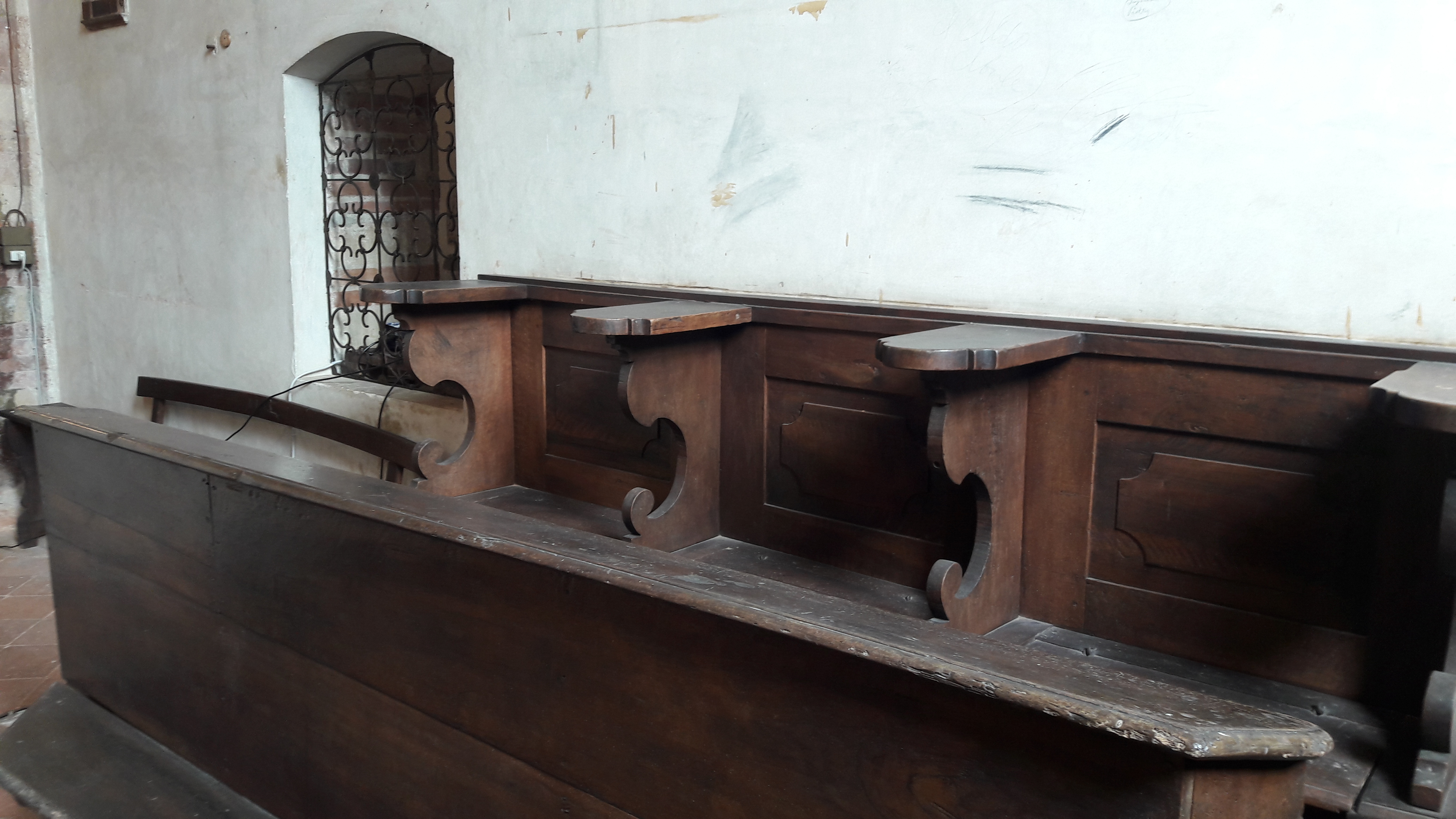 Cassine - Chiesa San Francesco interno This is a photo of a monument which is part of cultural heritage of Italy.